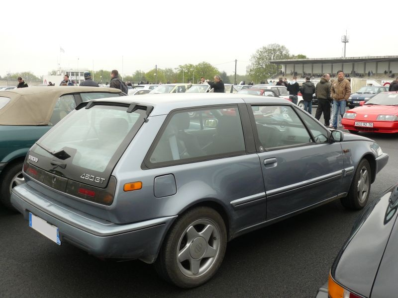 Français cadien: Montlhery avril 2012